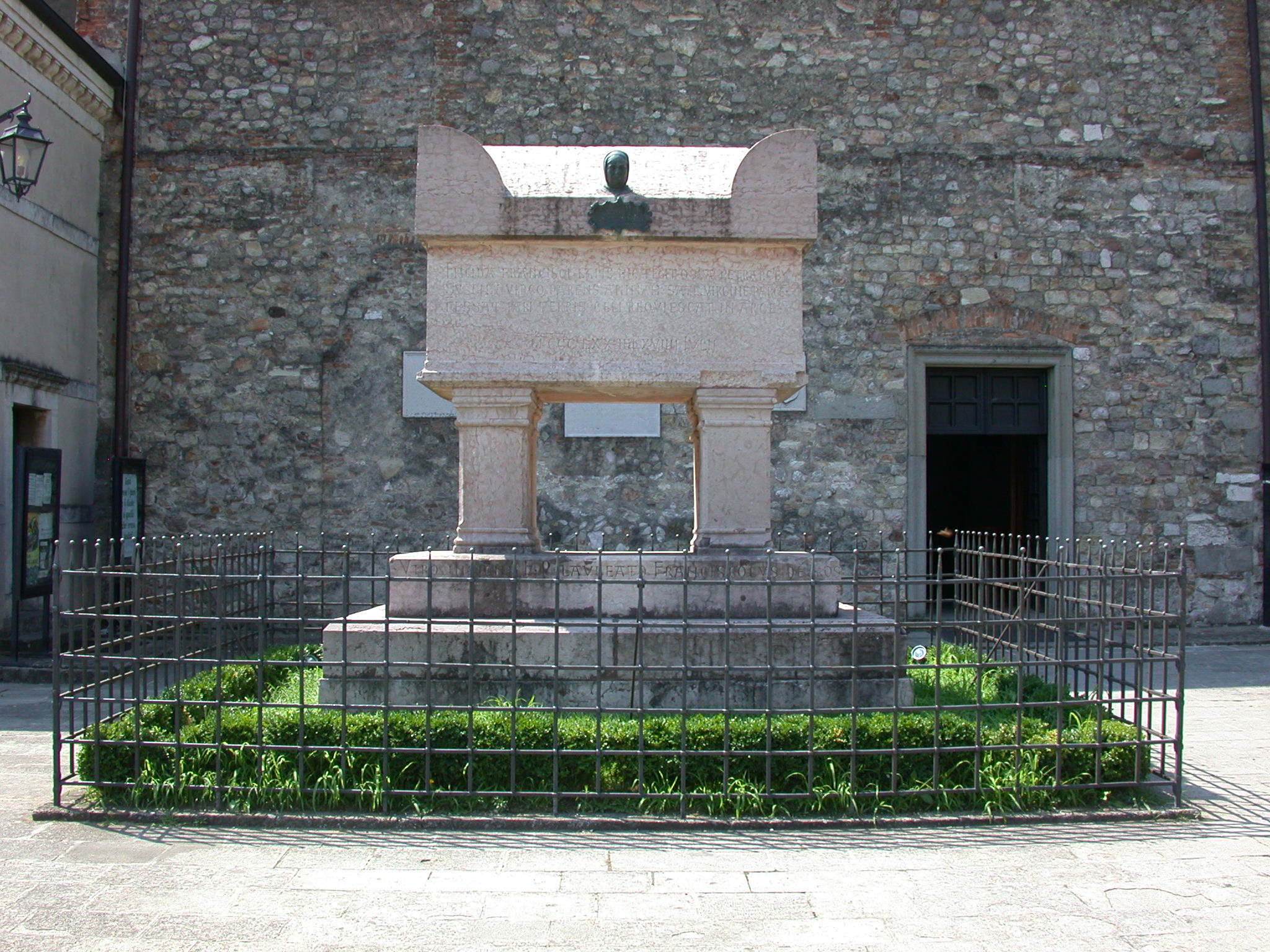 La Tomba di Petrarca a Arquà Petrarca